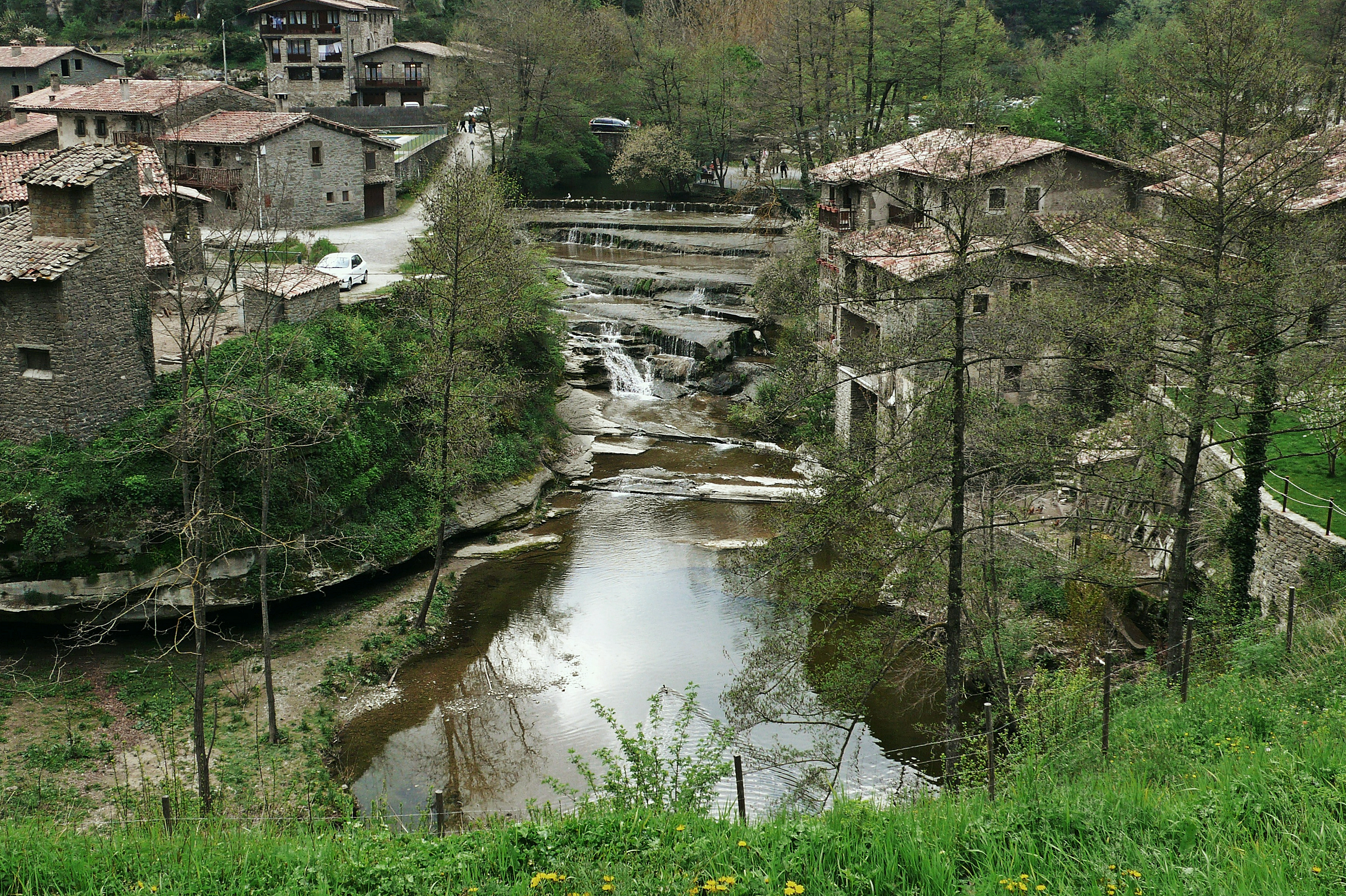 osona-cataluña